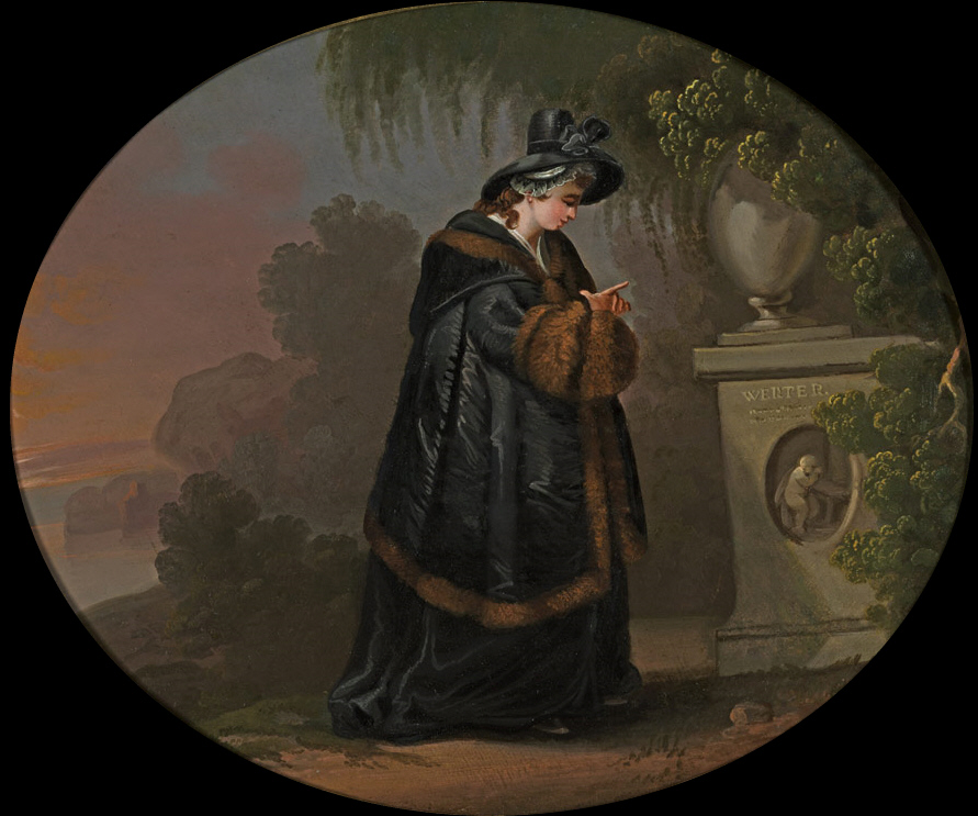 Lotte am Grabmal Werthers, Öl auf Blech. 25,5 x 31 cm (Oval).